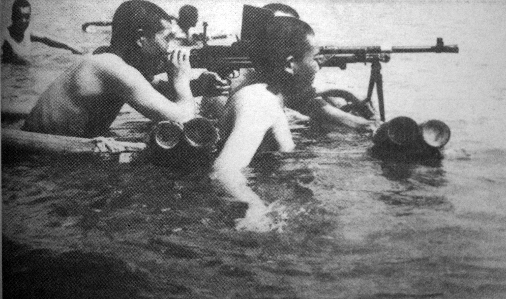 海南岛战役前四野练习水上射击